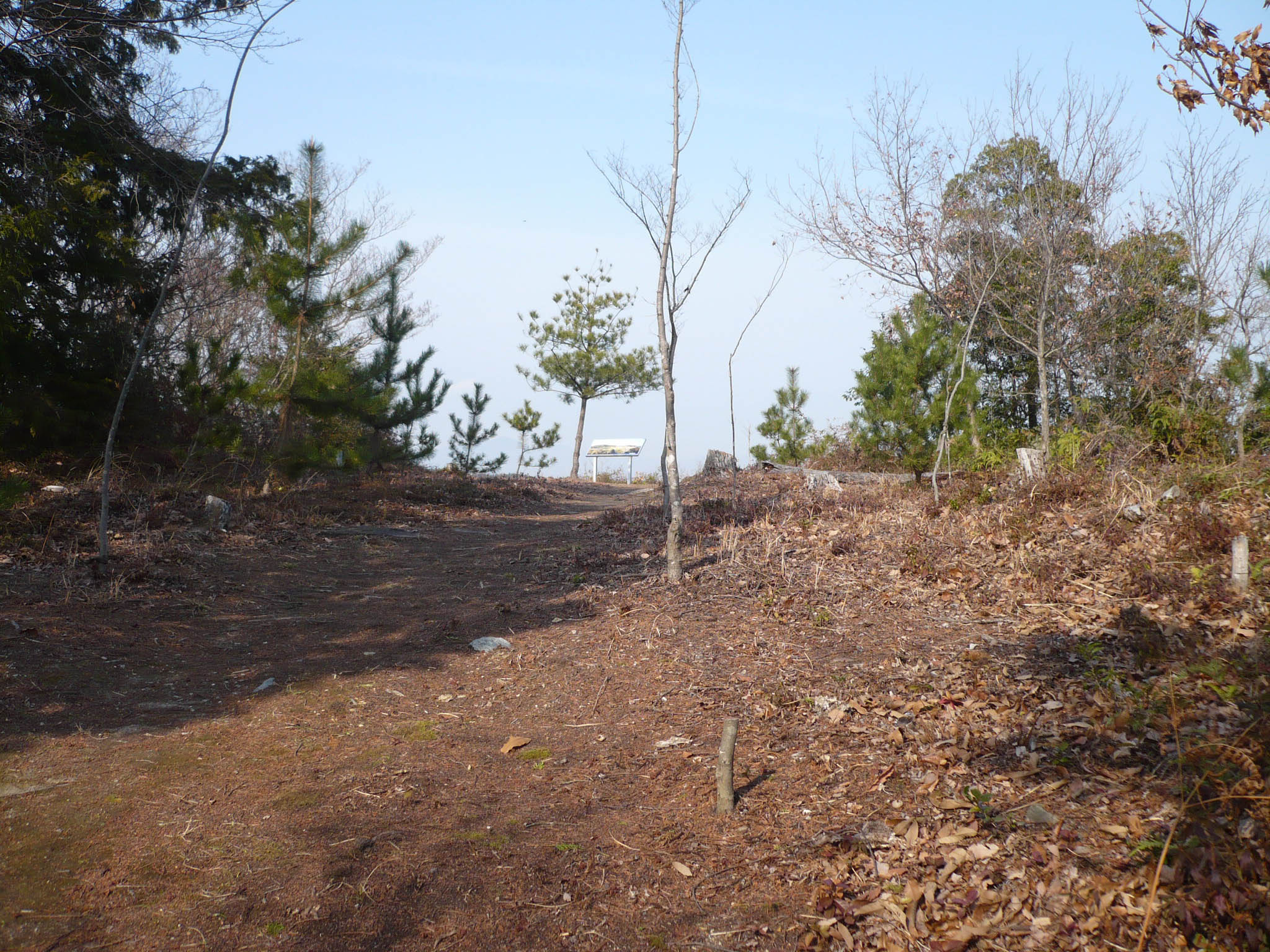 明神丸跡